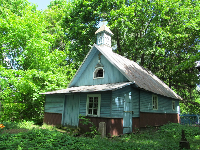 Пачапава. Мікалаеўская царква